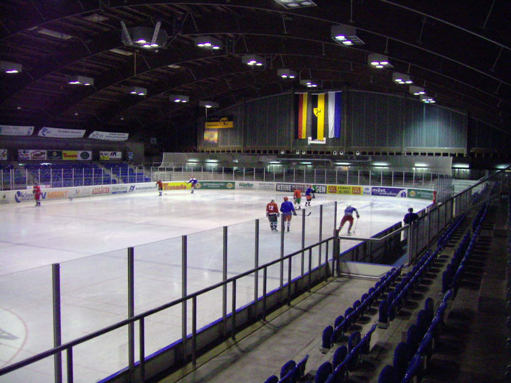 Die Arena in Füssen